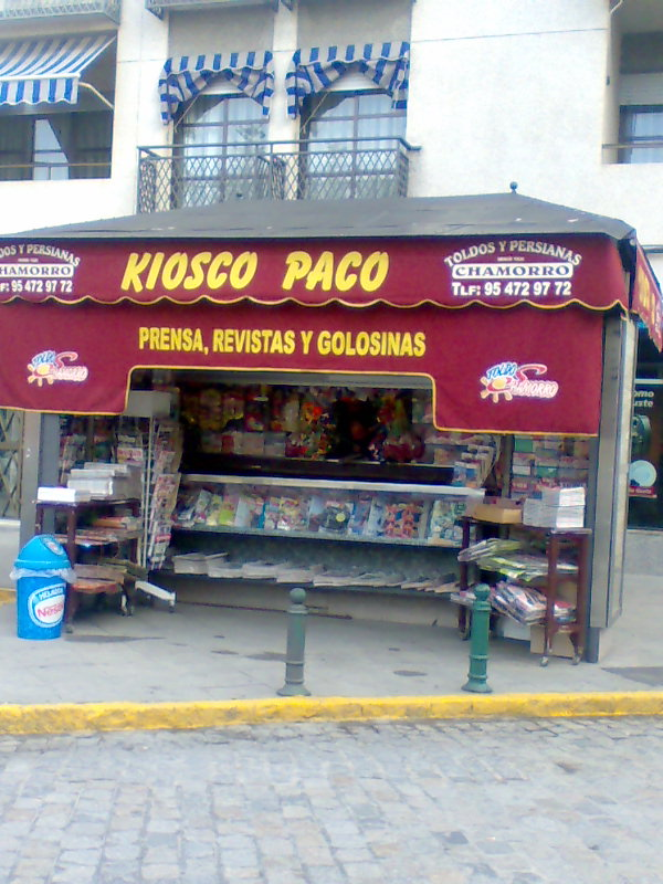 Kiosco de prensa en Dos Hermanas (Sevilla)